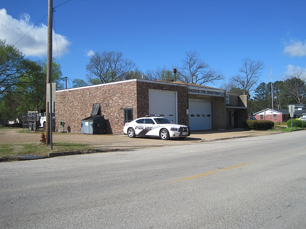 Madison, Arkansas